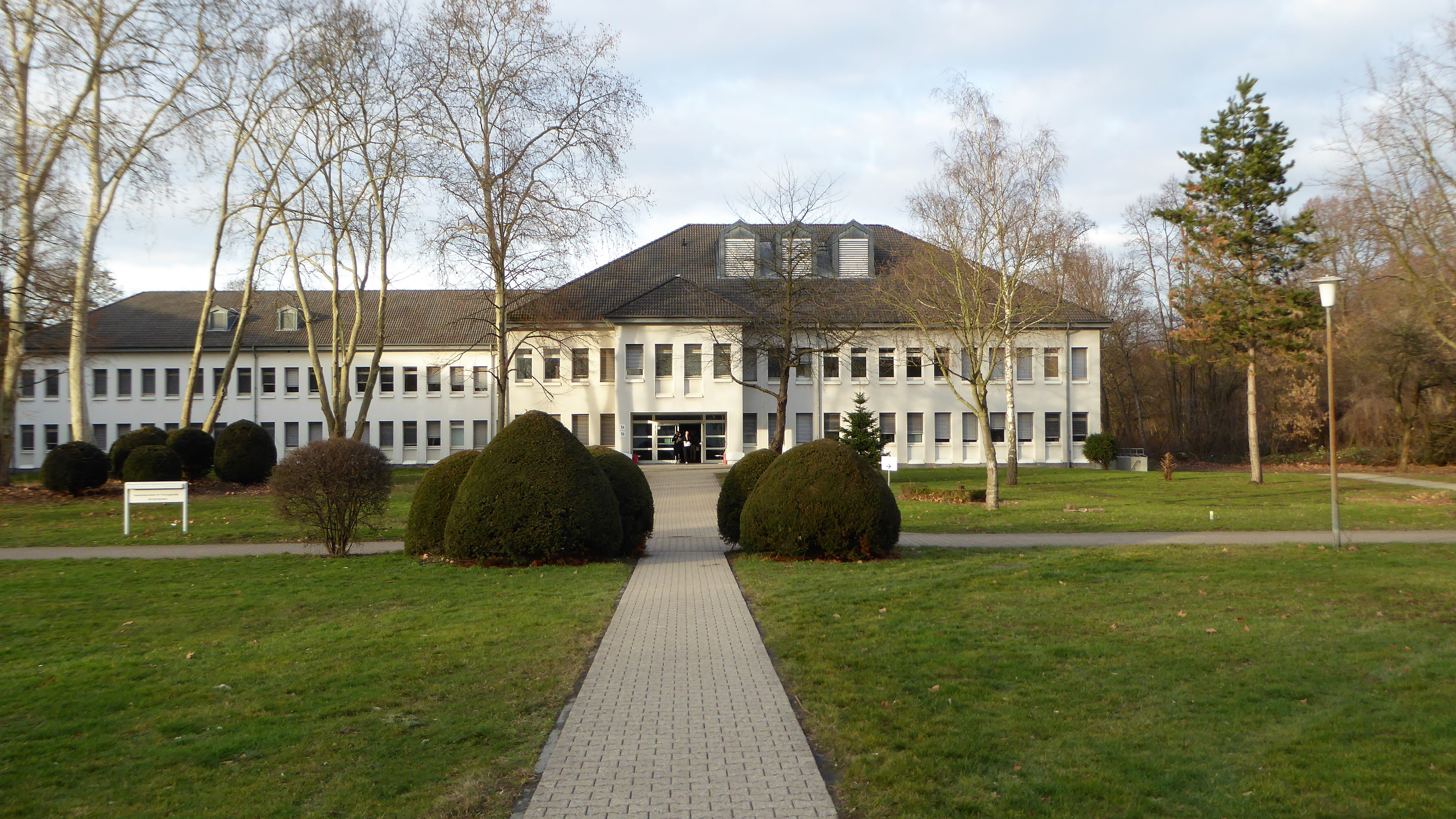 Haupteingang Assessmentcenter für Führungskräfte der Bundeswehr